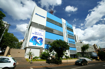 Fachada da Sercomtel Fixa, Londrina, Paraná